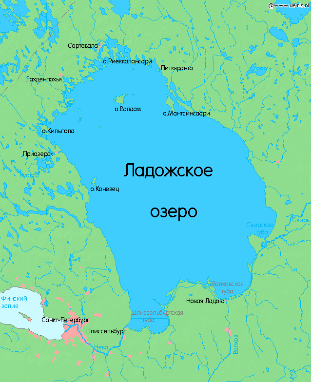 Ладожское озеро. Lake Ladoga in Russia.